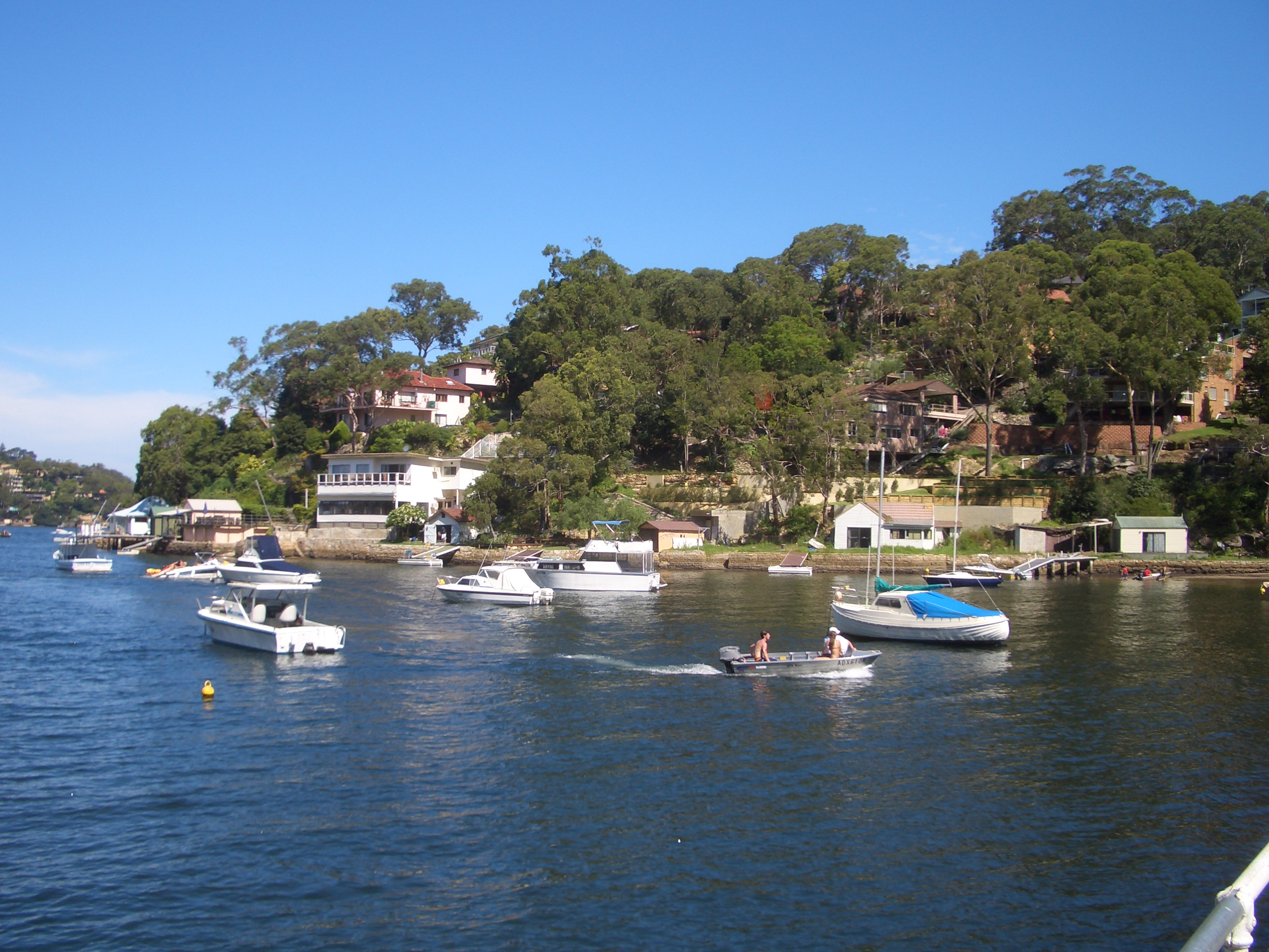 Gymea_Bay